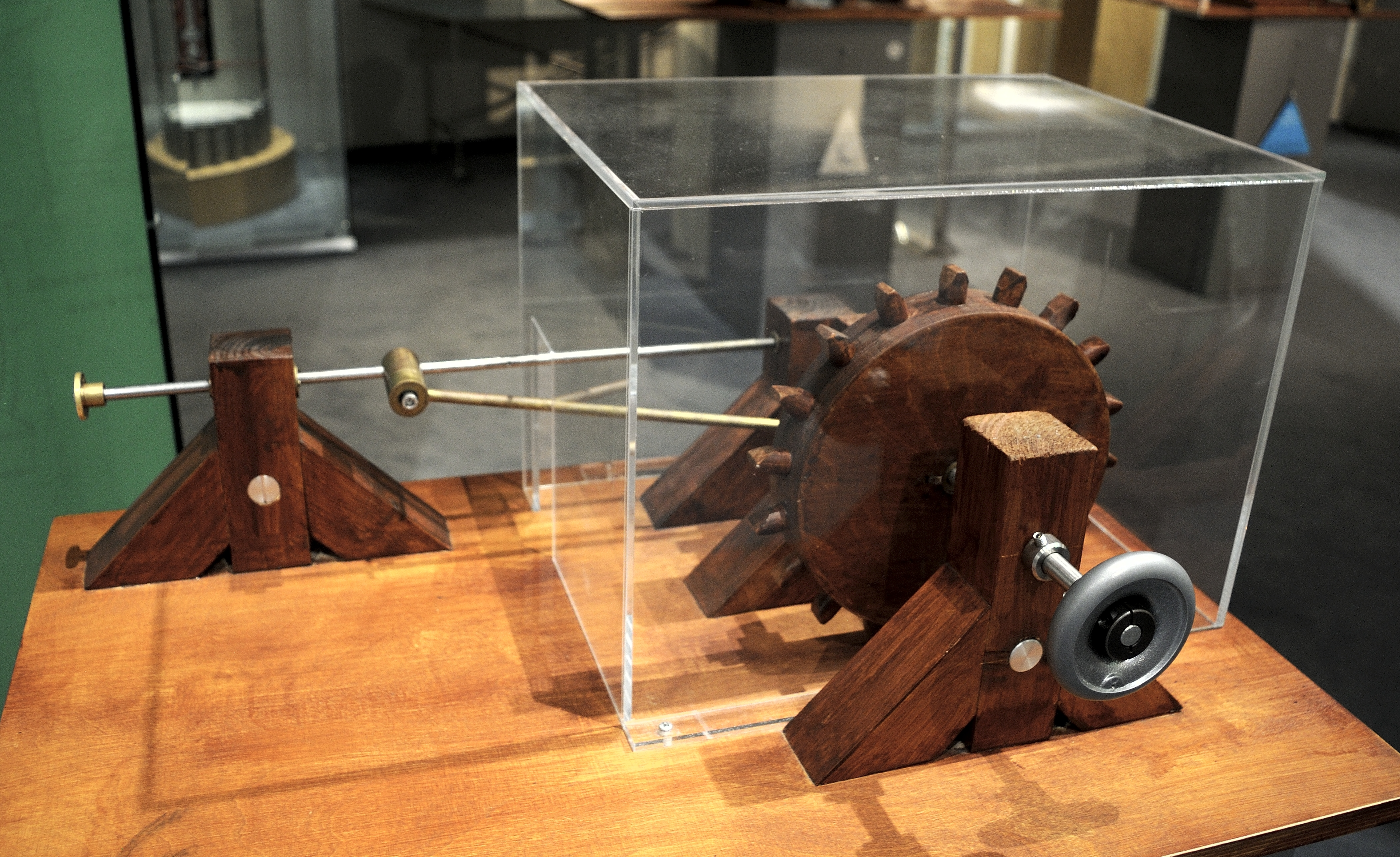 Schubkurbel. Modell nach Leonardo da Vinci im Codex Madrid I. Bild aufgenommen während der GLAM-on-Tour-Veranstaltung im Deutschen Museum Bonn 2016.